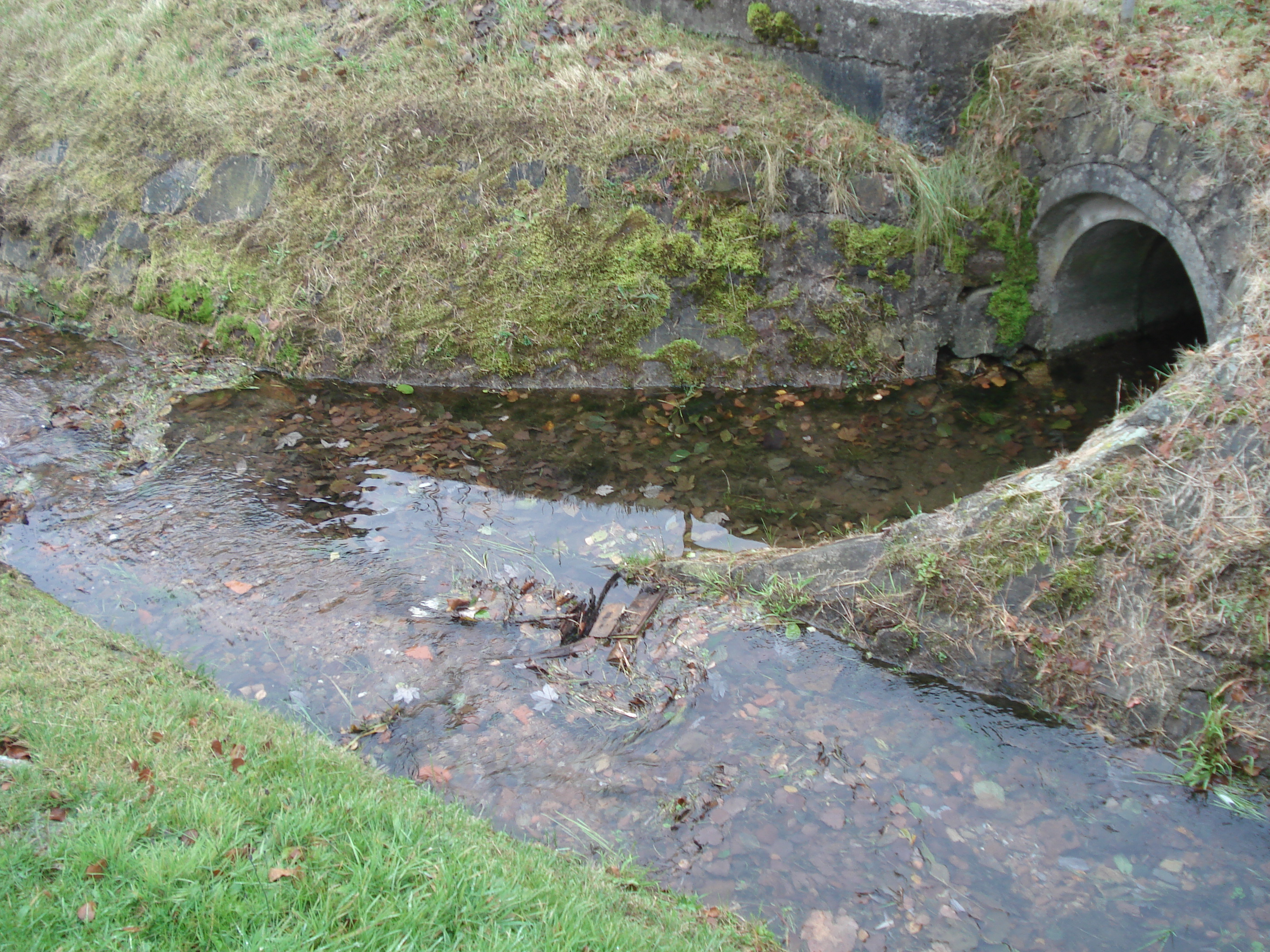 Der Welzbach (rohr rechts) mündet in den Aubach (von vorne rechts nach hinten links)